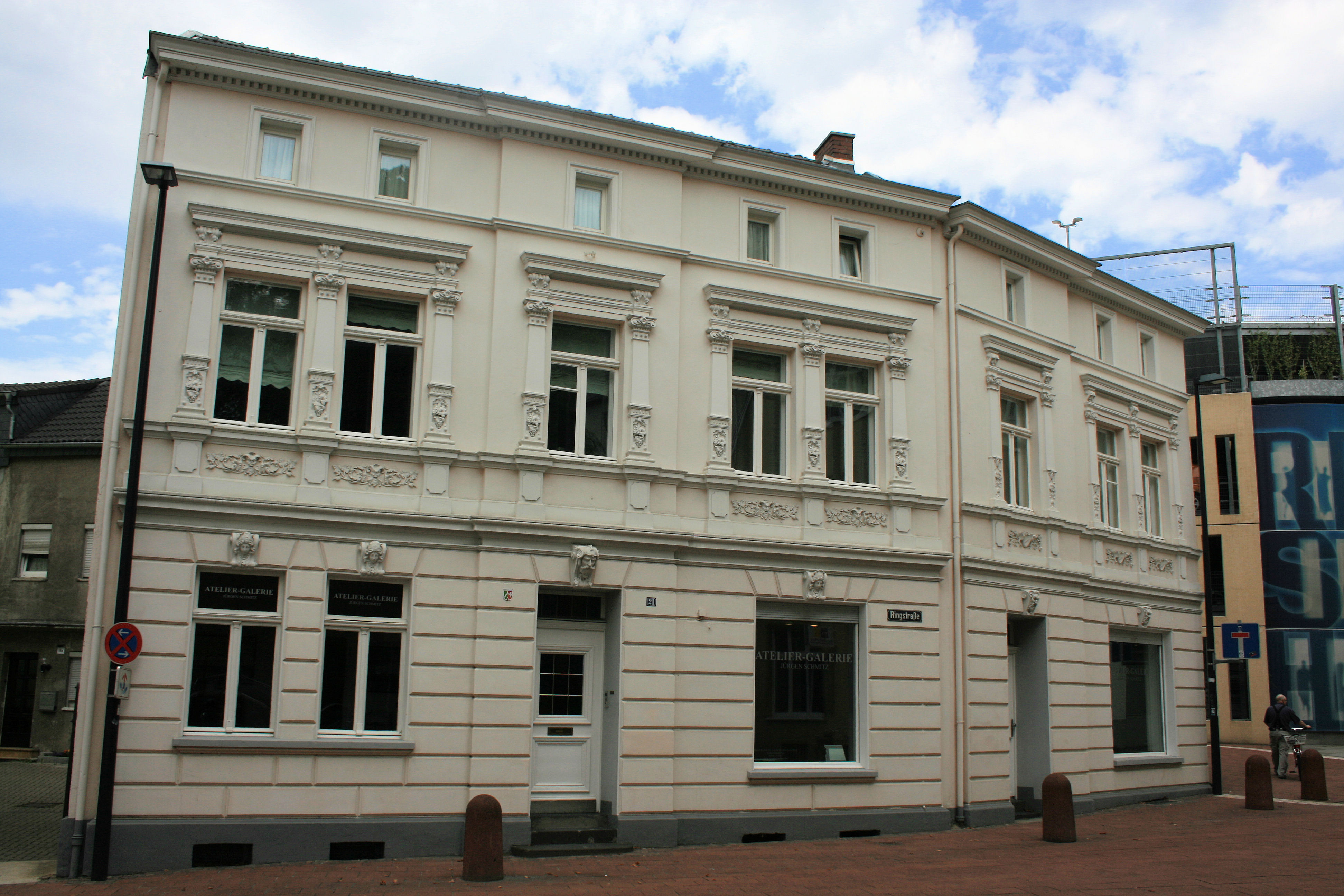 Denkmalgeschütztes ehem. Wohn- und Geschäftshaus mit Werkstatt (heute Wohnhaus), Ringstraße 21, Siegburg